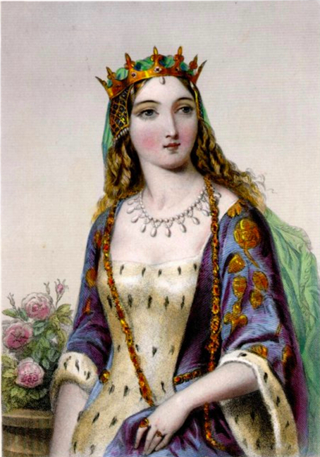 Portrait de Marguerite d'Anjou (1430-1482), princesse consort d'Angleterre